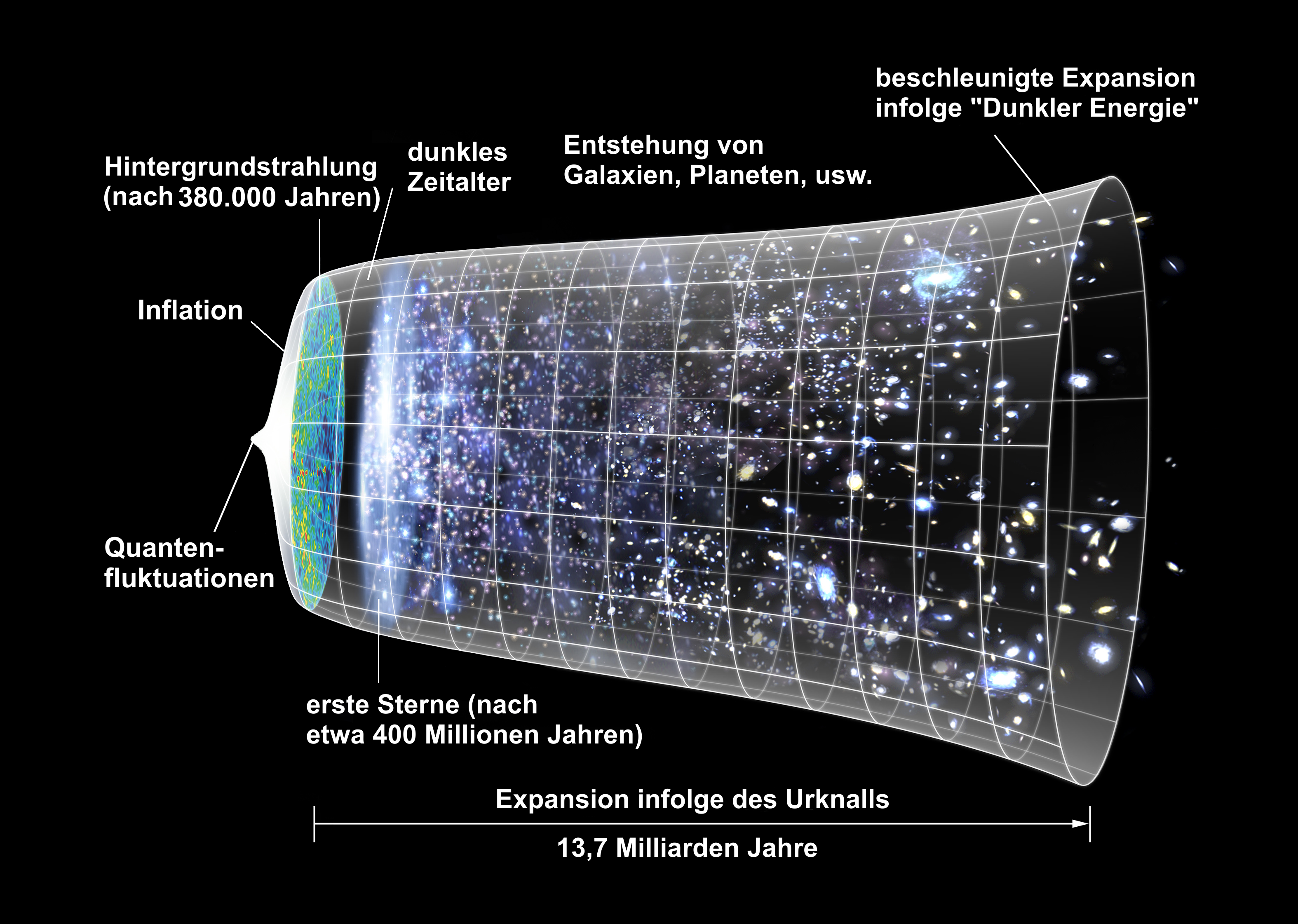 Expansion des Universums und Entwicklungsstadien als Modell.